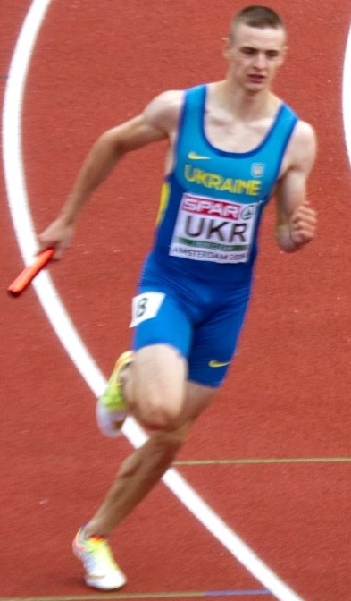 series